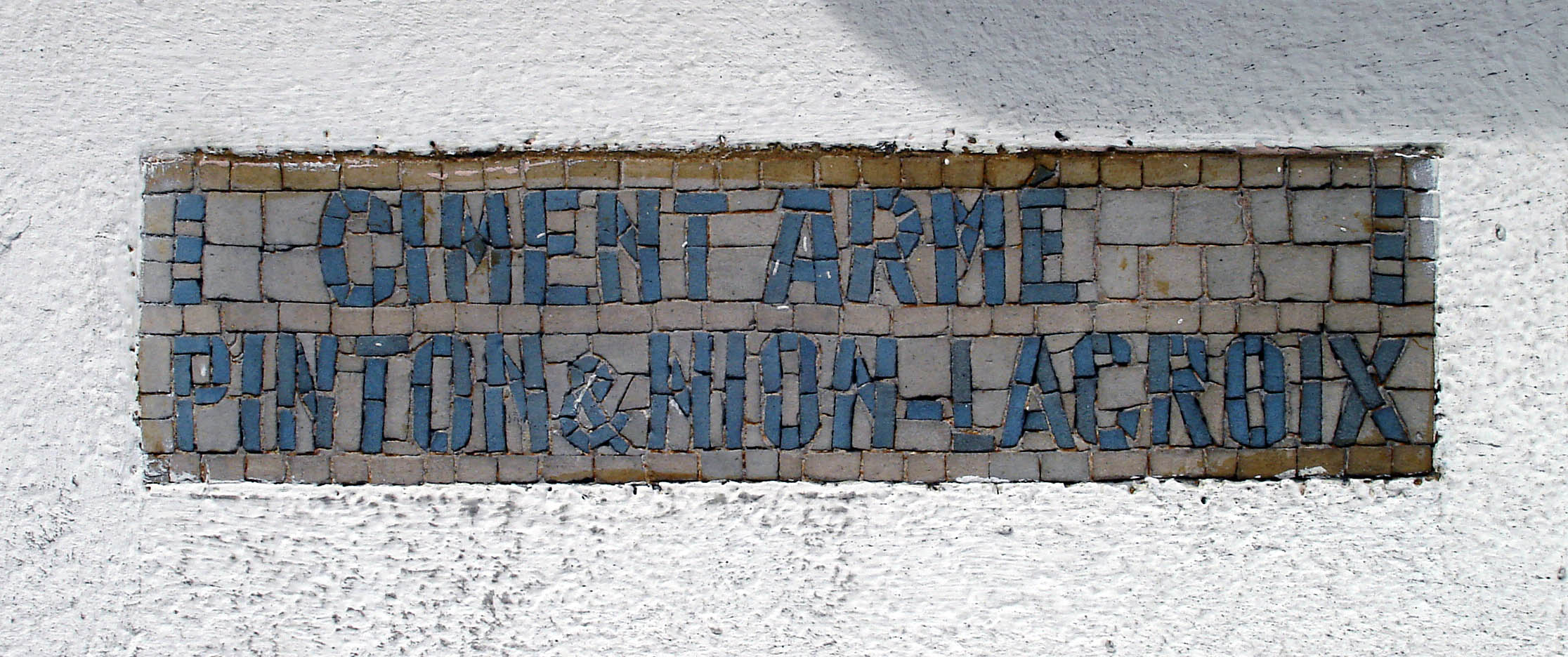 Station Pelleport de la ligne 3bis du métro de Paris, France